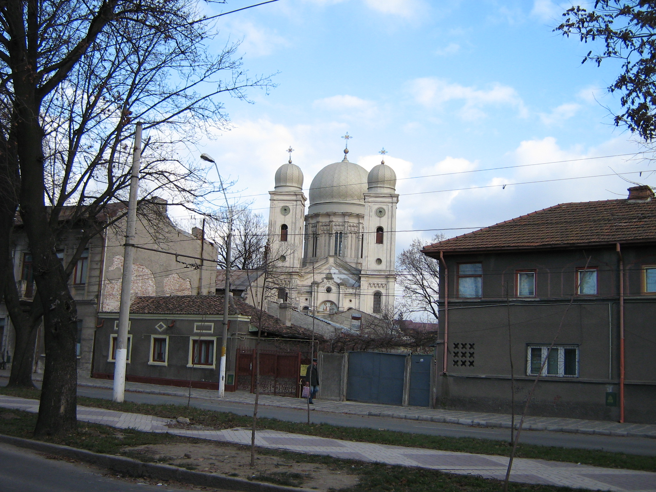 Holy Apostles Church, seen from Alexandru Ioan Cuza Street, Braila, Romania